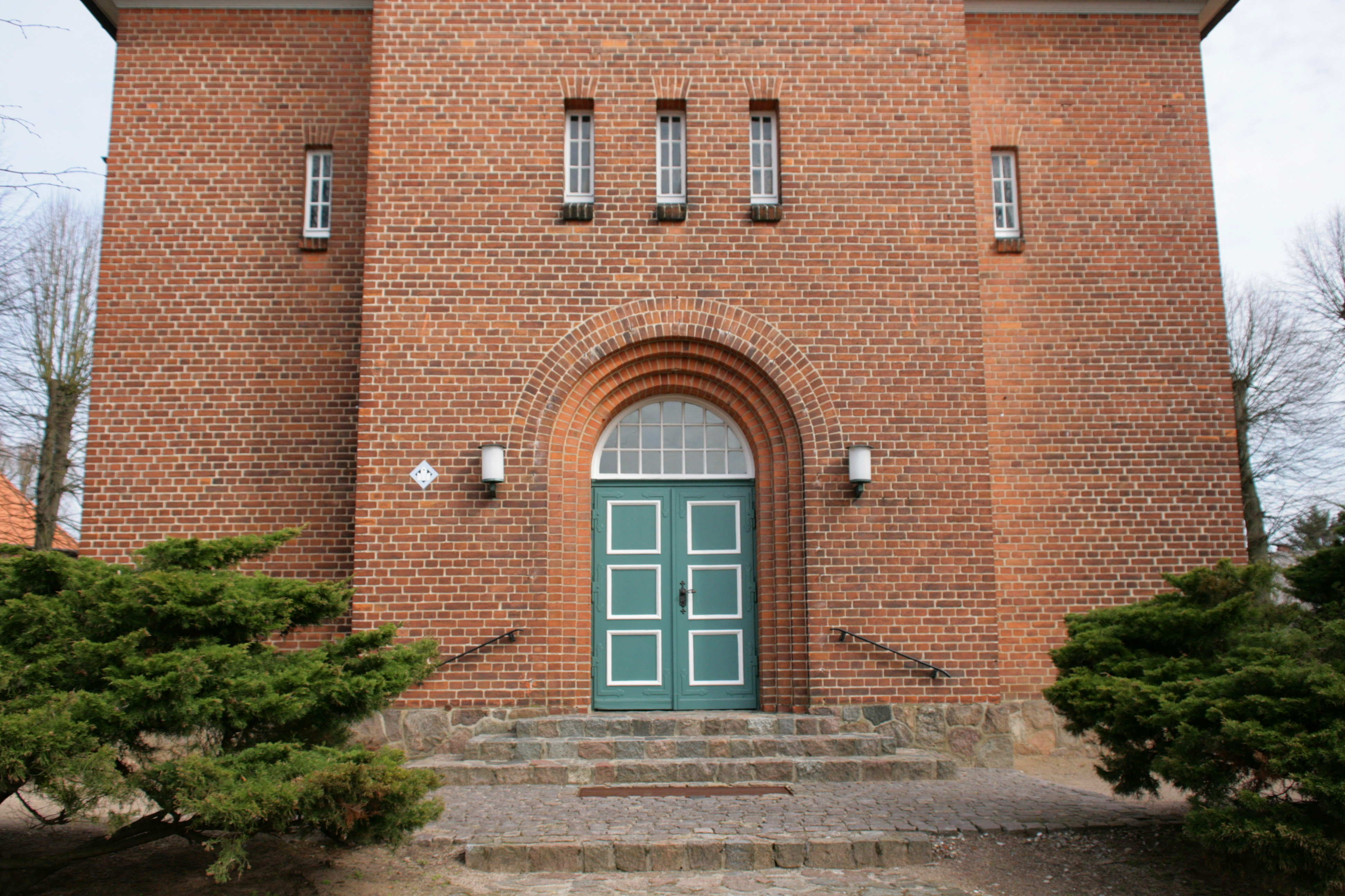 St.-Michaelis-Kirche im Dreieck Bahnhofstraße/Niendorfer Straße/Kirchplatz in Bienenbüttel